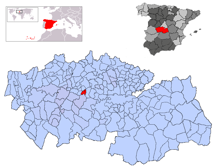 La Mata en la provincia de Toledo